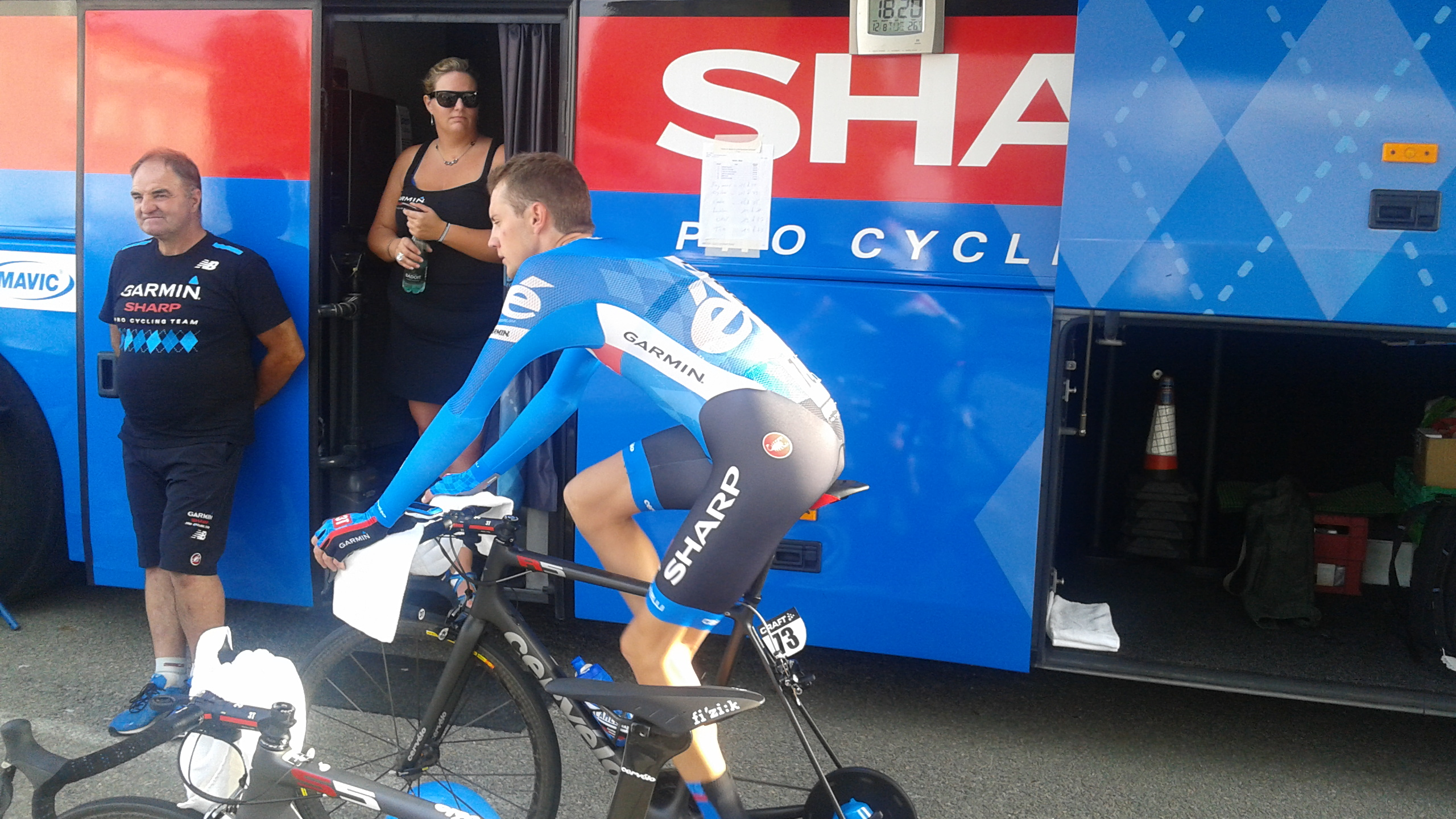 Dylan Girdlestone lors du prologue du Tour de l'Ain 2014